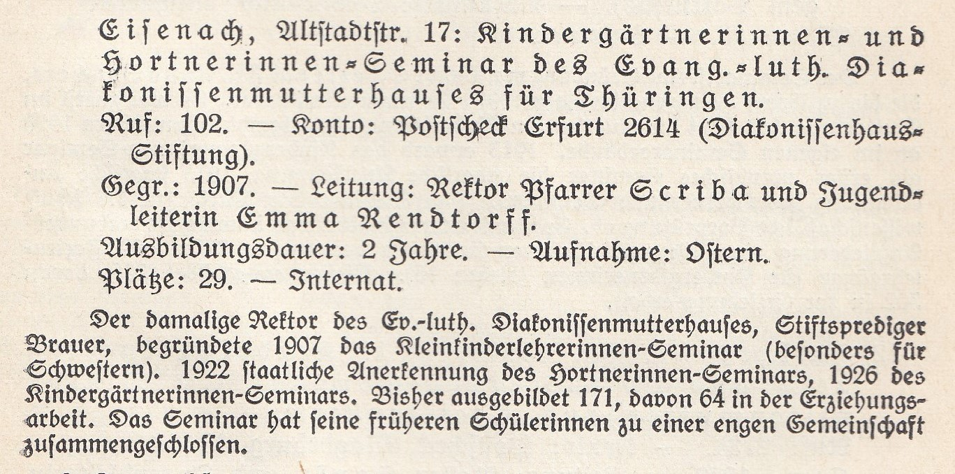 Werbung für das Kindergärtnerinnenseminar Eisenach